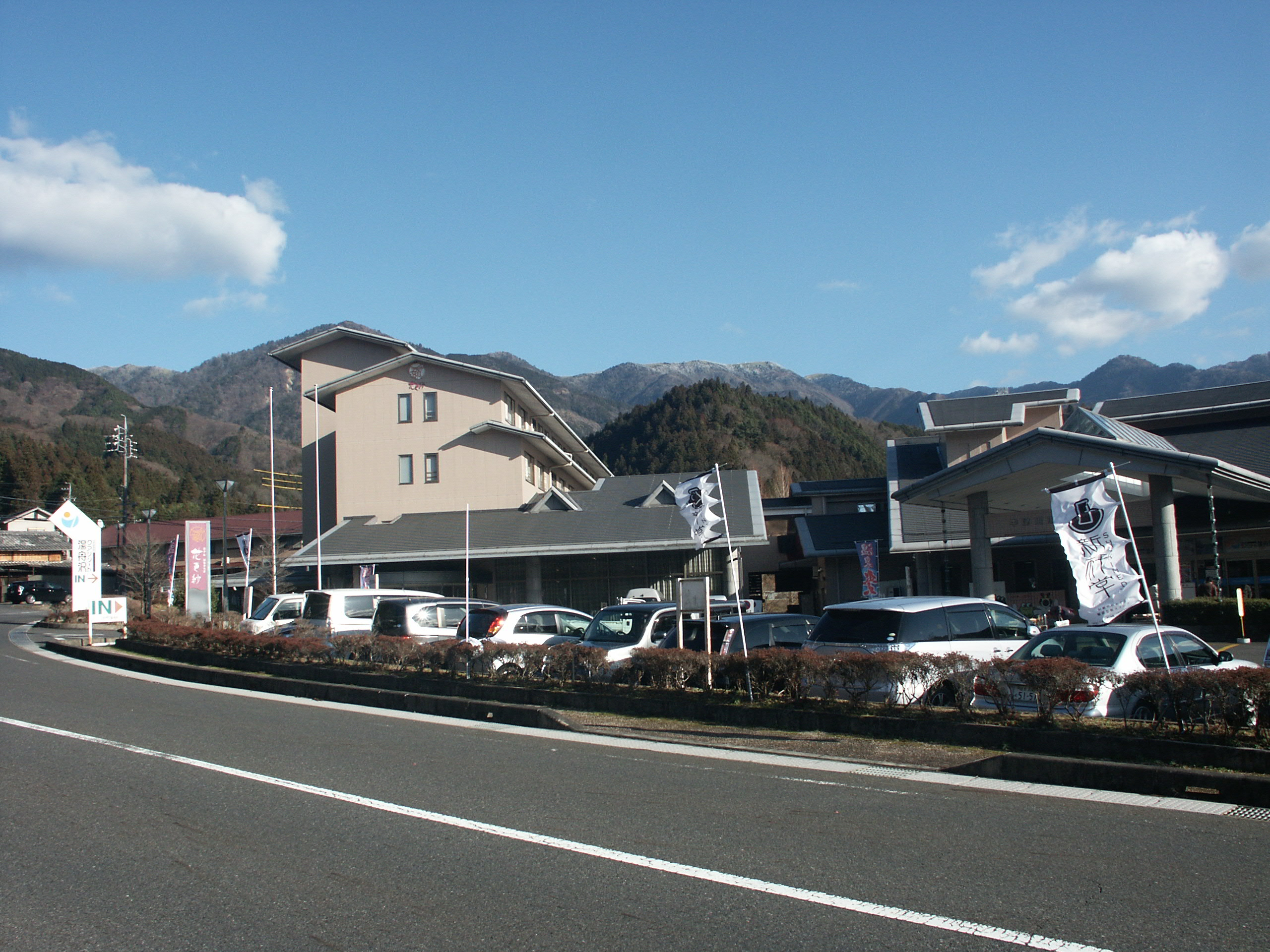 岐阜県中津川市にあるクアリゾート湯船沢